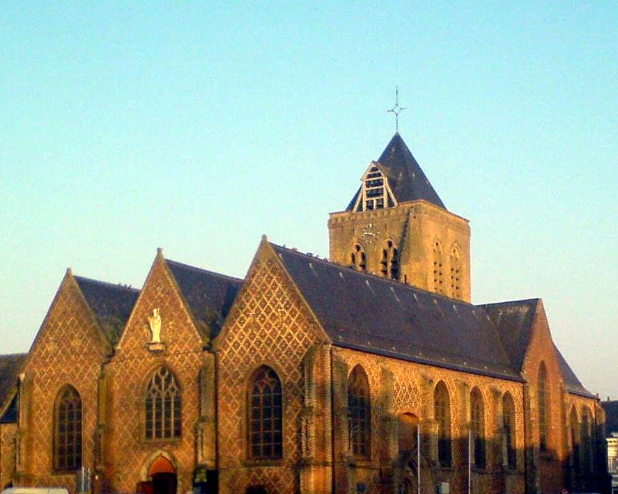 Eglise Saint-Folquin (hallekerke) à Esquelbecq